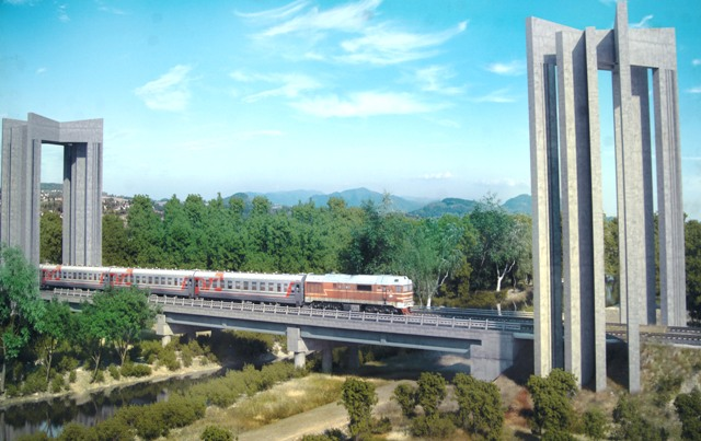 تصویری از ماکت پل مرزی که تا پایان 2016 میلادی، احداث خواهد شد